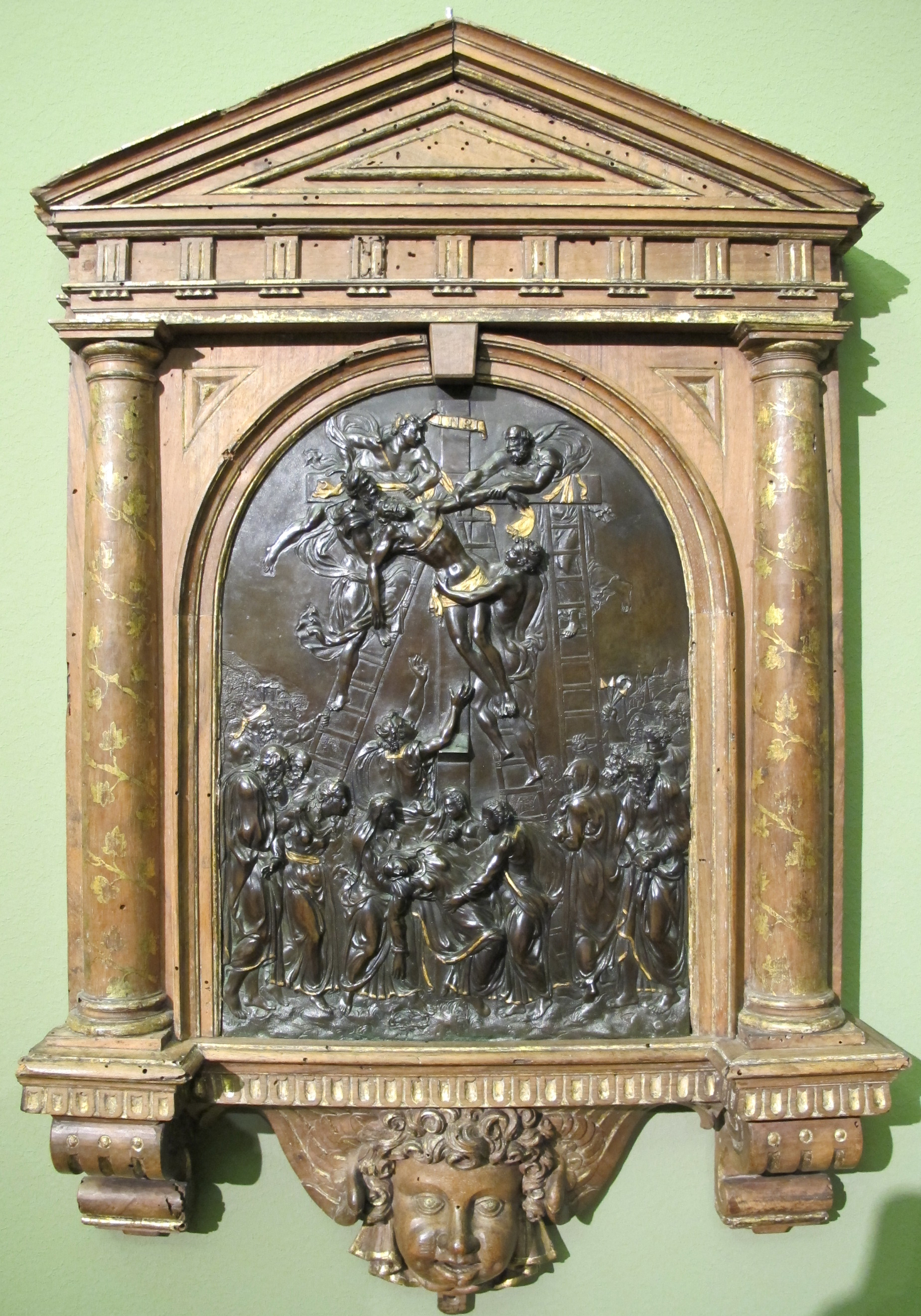 Bartolomeo ammannati, discesa dalla croce